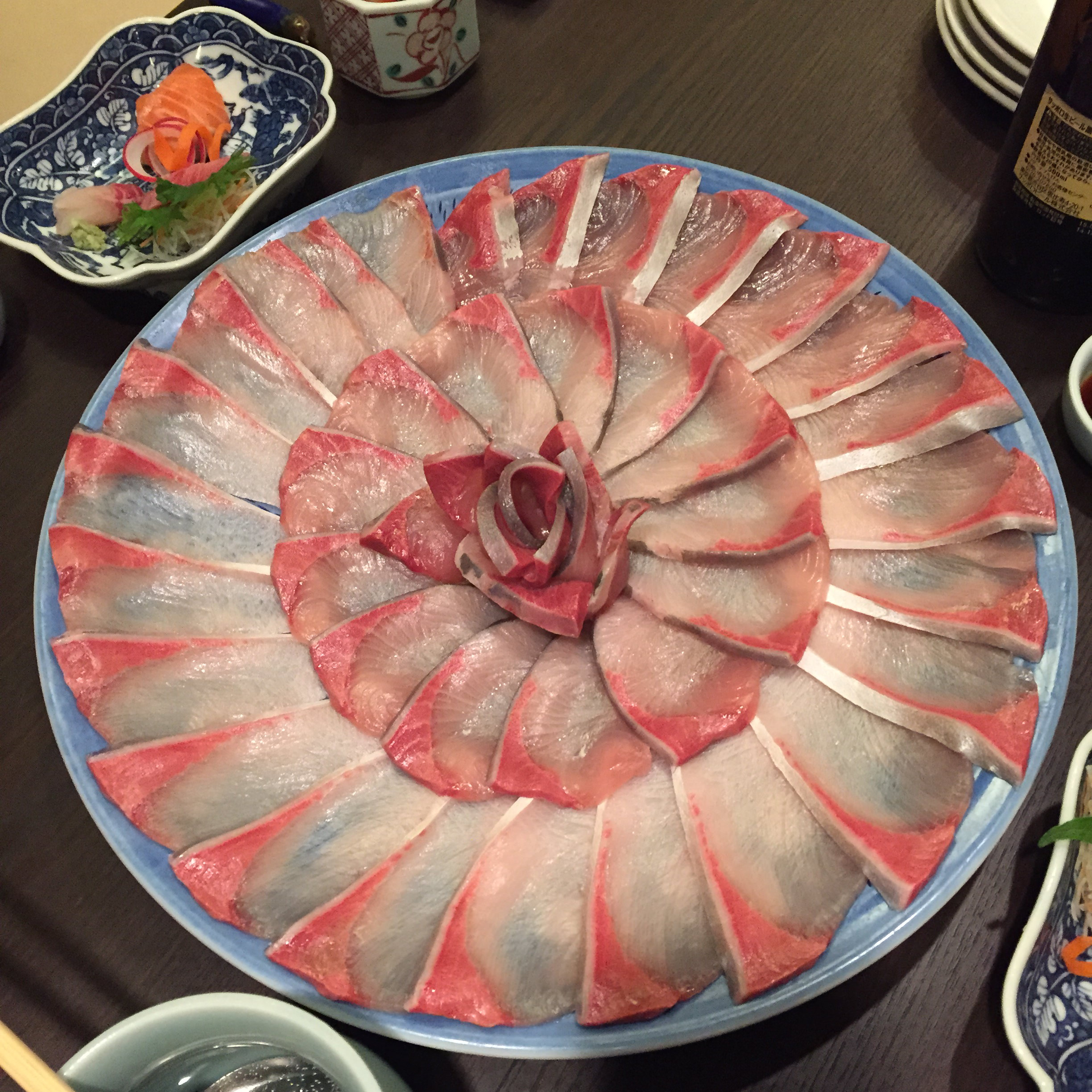 鰤（ぶり）しゃぶ